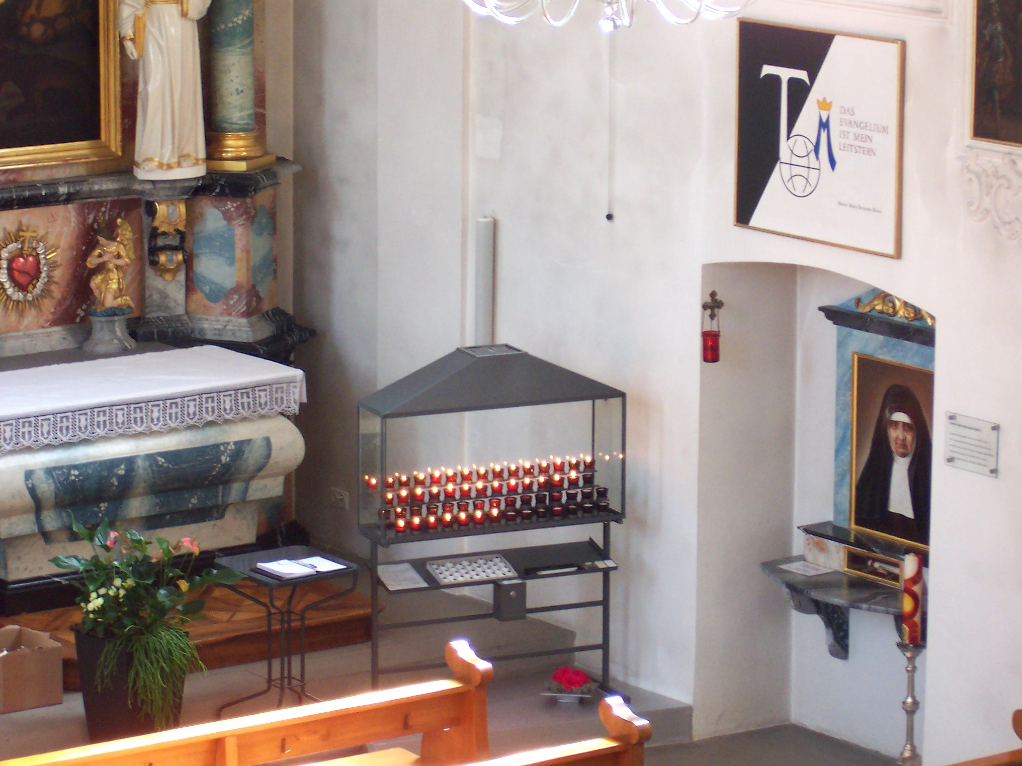 Altar der Heiligen Maria Bernarda Bütler an der südlichen Innenwand der Pfarrkirche St.Nikolaus in Auw, Kanton Aargau, Schweiz.